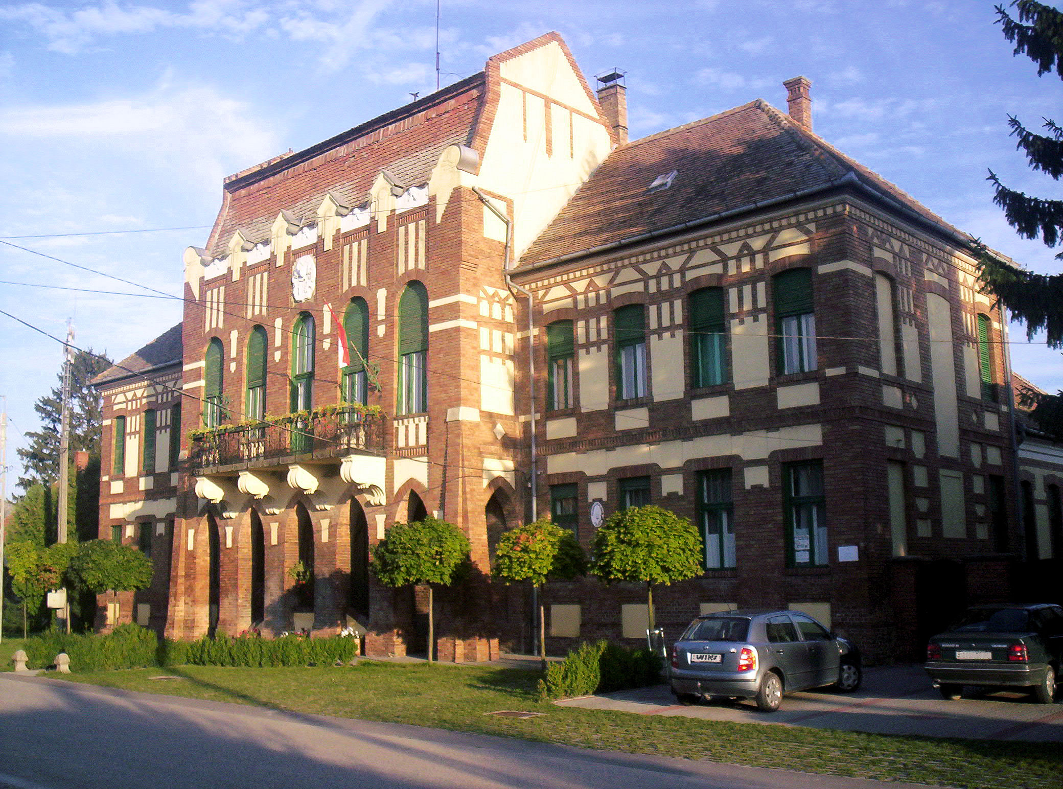 A fajszi polgármesteri hivatal – photo taken by uploader User:Csanády in 2006.